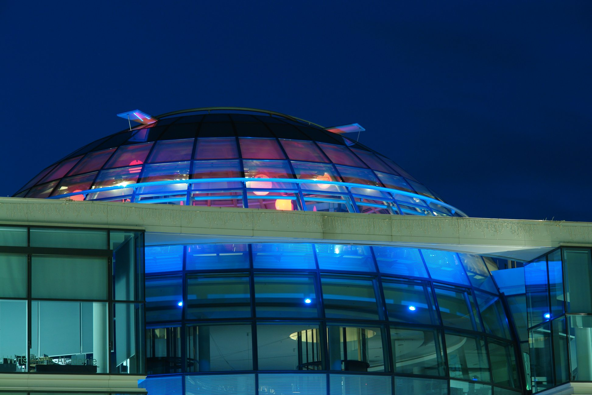 Neues Kugelhaus Dresden (Detail)